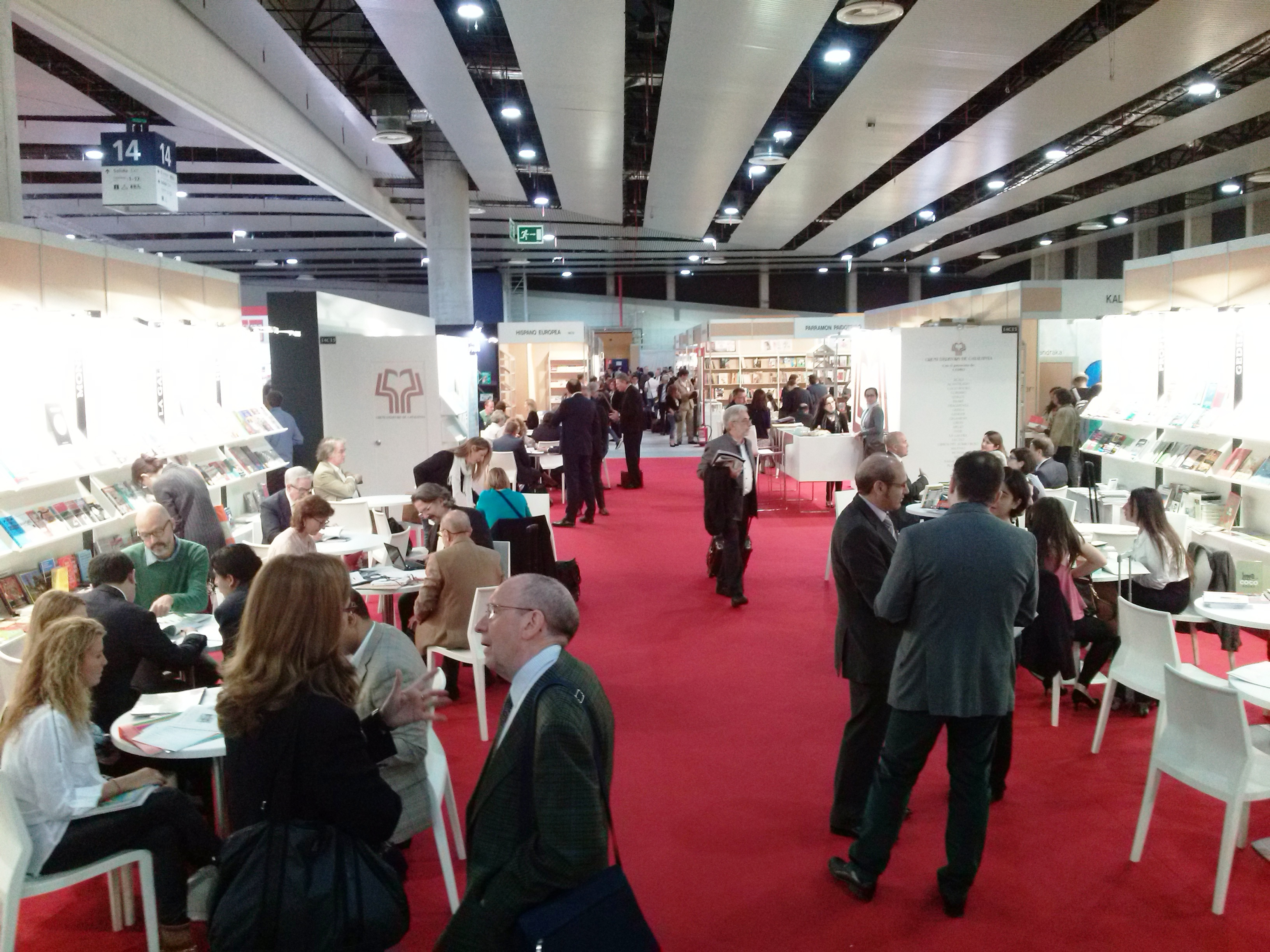 Stand del Gremi d'Editors de Catalunya en Liber